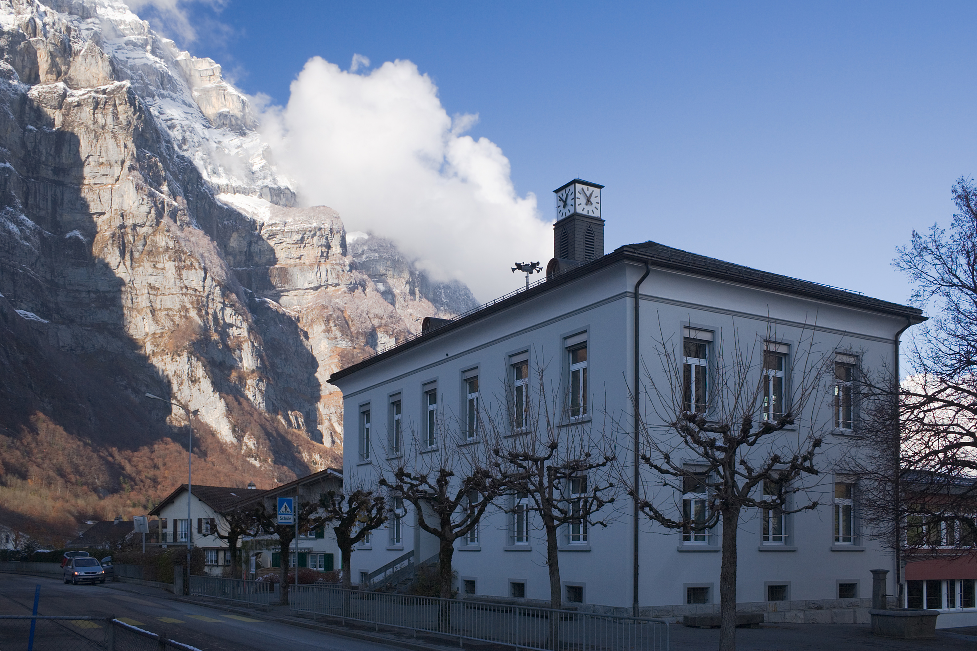 Das Schulhaus von Riedern, Schweiz